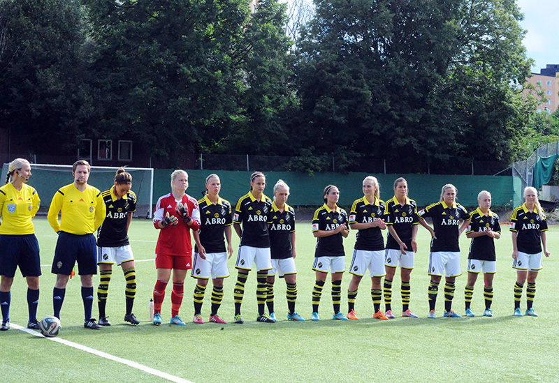 AIK squad